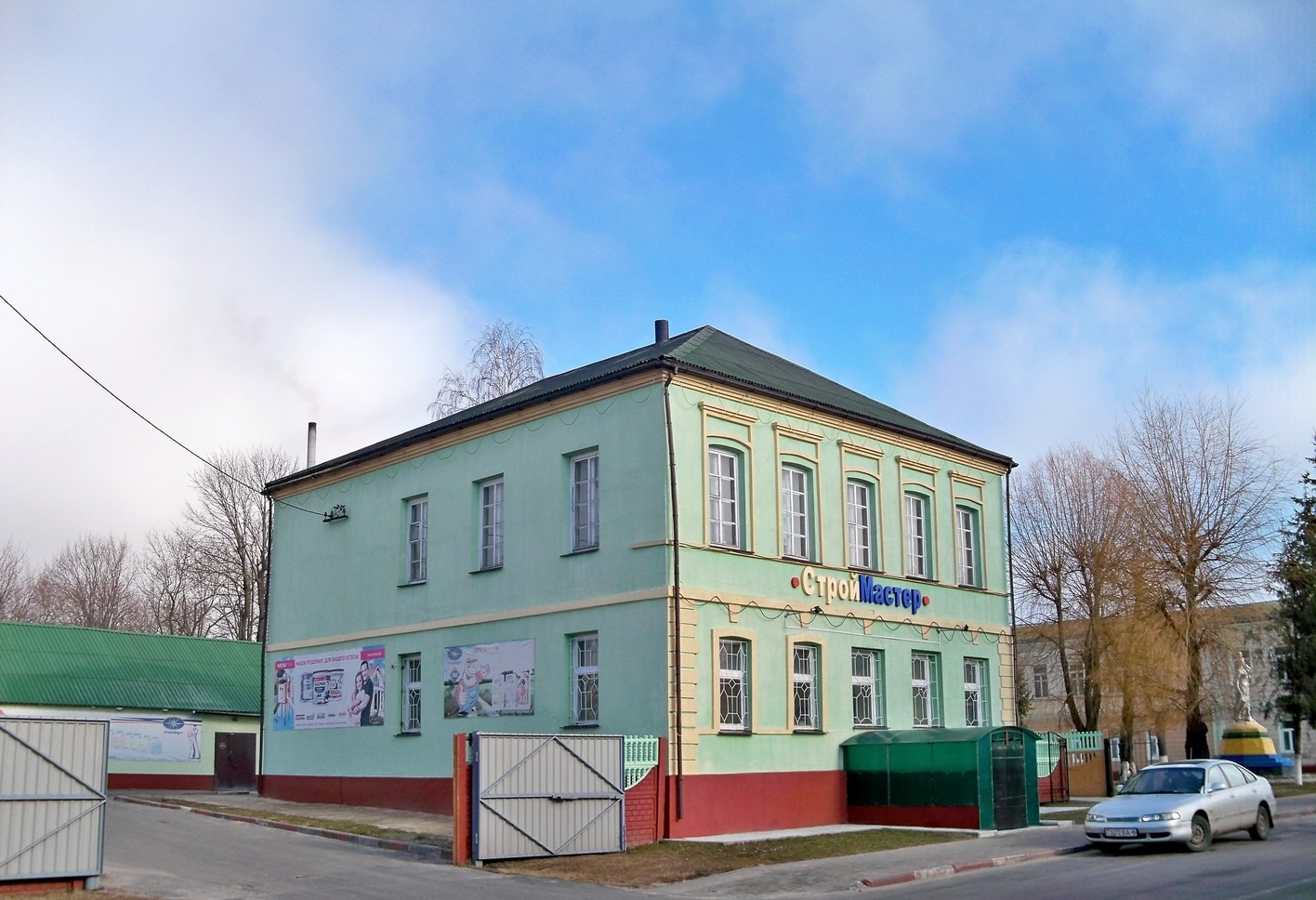 Мсціслаў. Савецкая вуліца, 16 (2017)